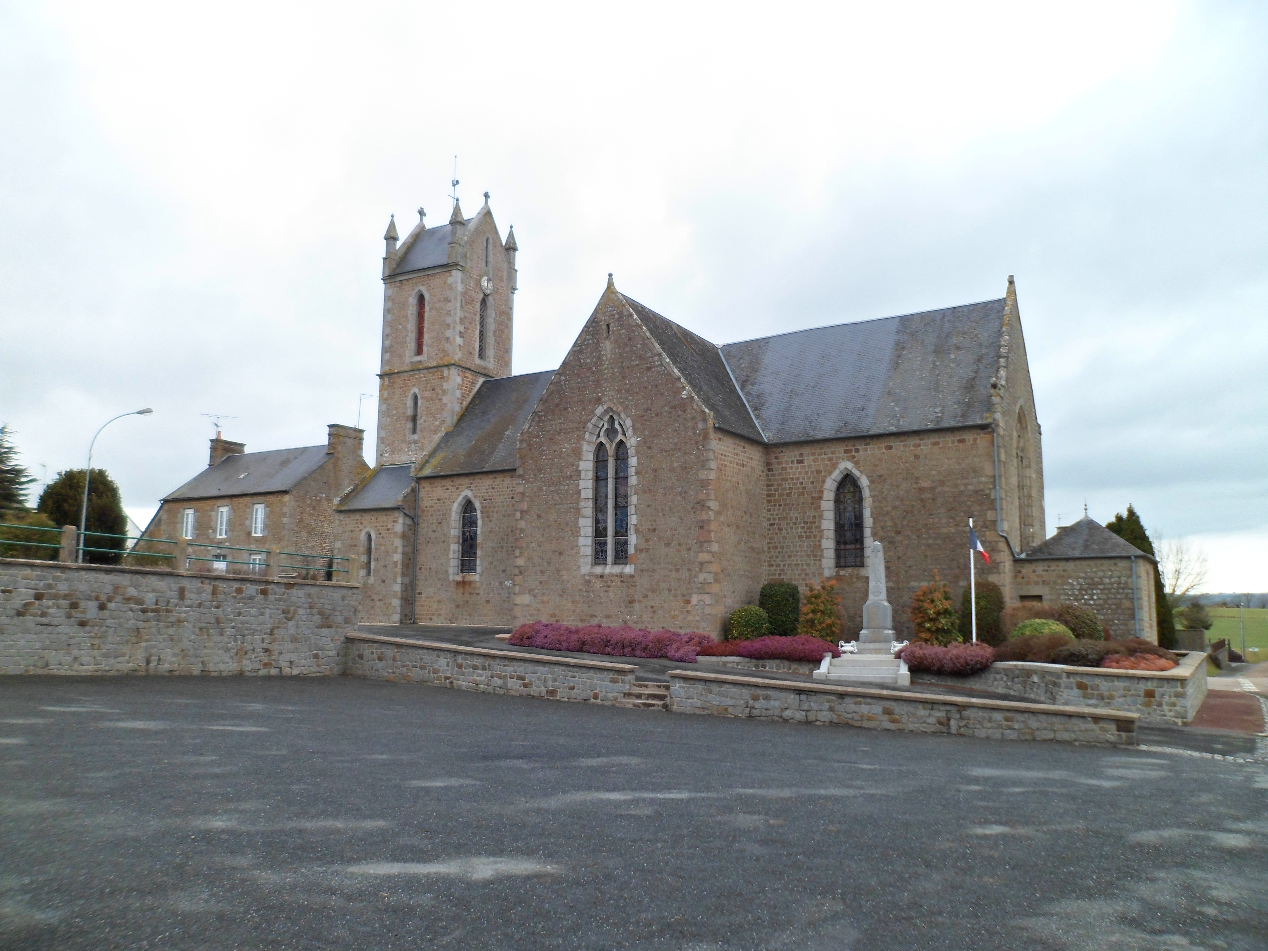 Église Saint-Hilaire de Villechien